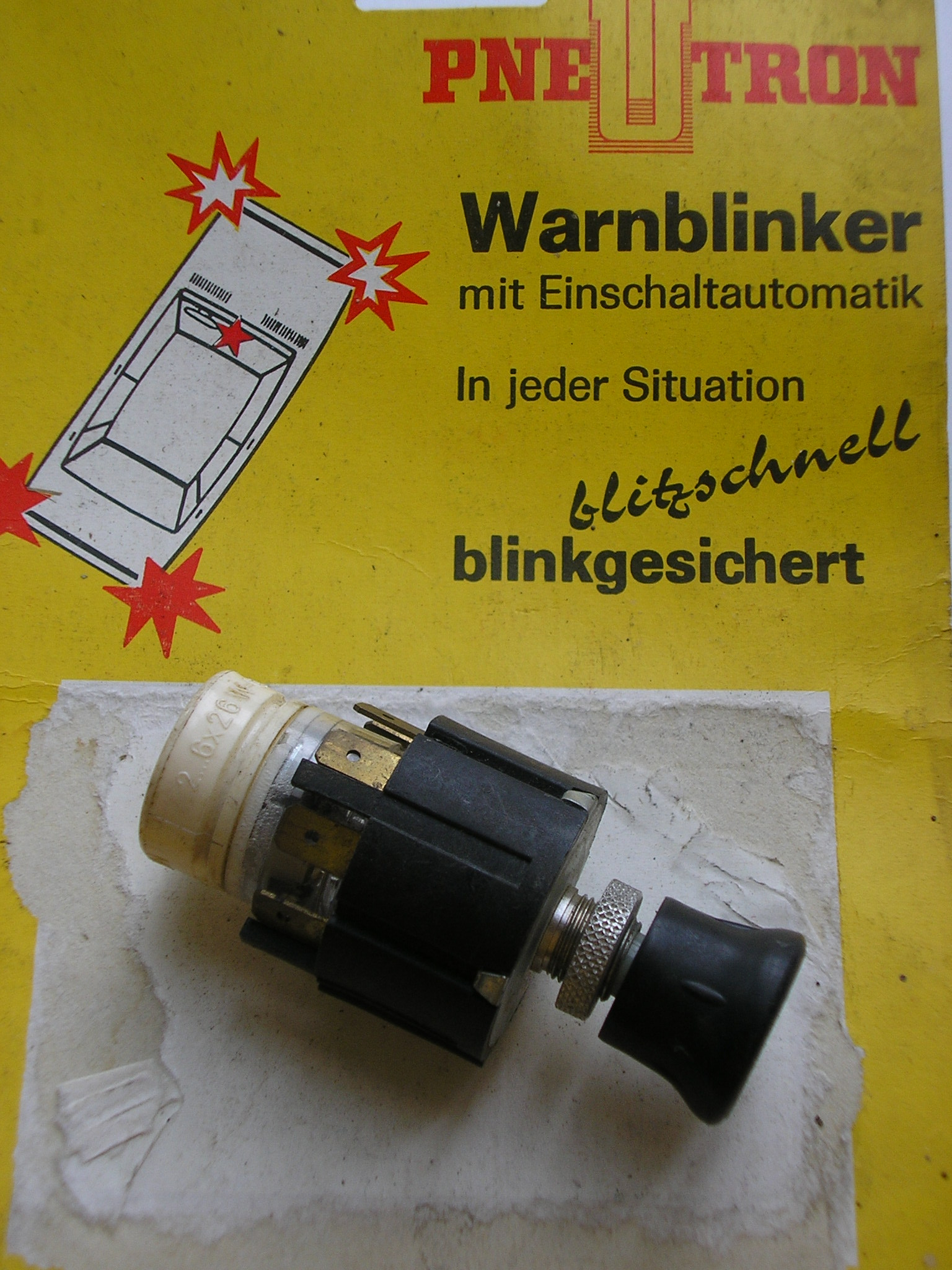 Pneumatischer Blinkgeber (Fa. Pneutron) als Zusatzgerät für die Warnblinkanlage von älteren Pkw (1969)